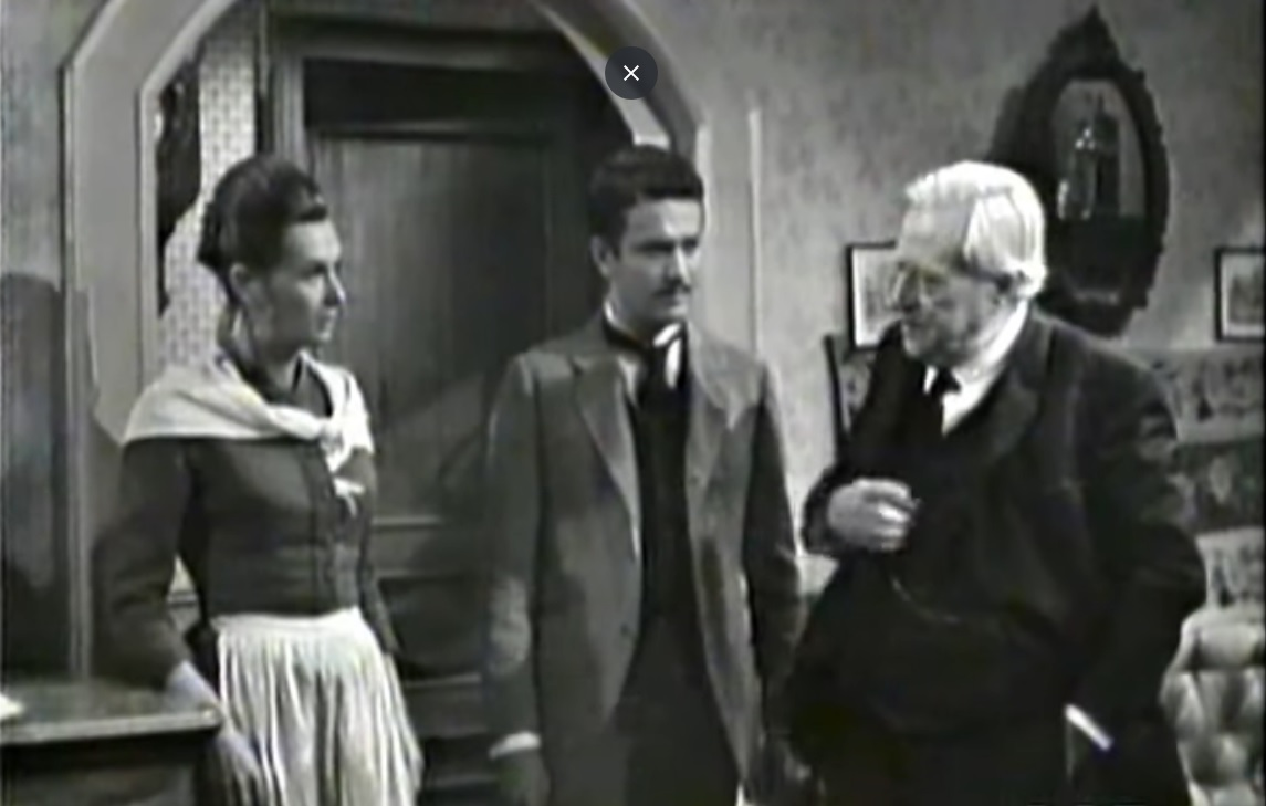 Rappresenta tre dei personaggi della commedia La famegia del santolo di Giacinto Gallina andata in onda sul Programma Nazionale Rai il 24 aprile 1966, interpretati da Mariolina Bovo (Nina), Mario Bardella (Giulio) e Cesco Baseggio (Micel).